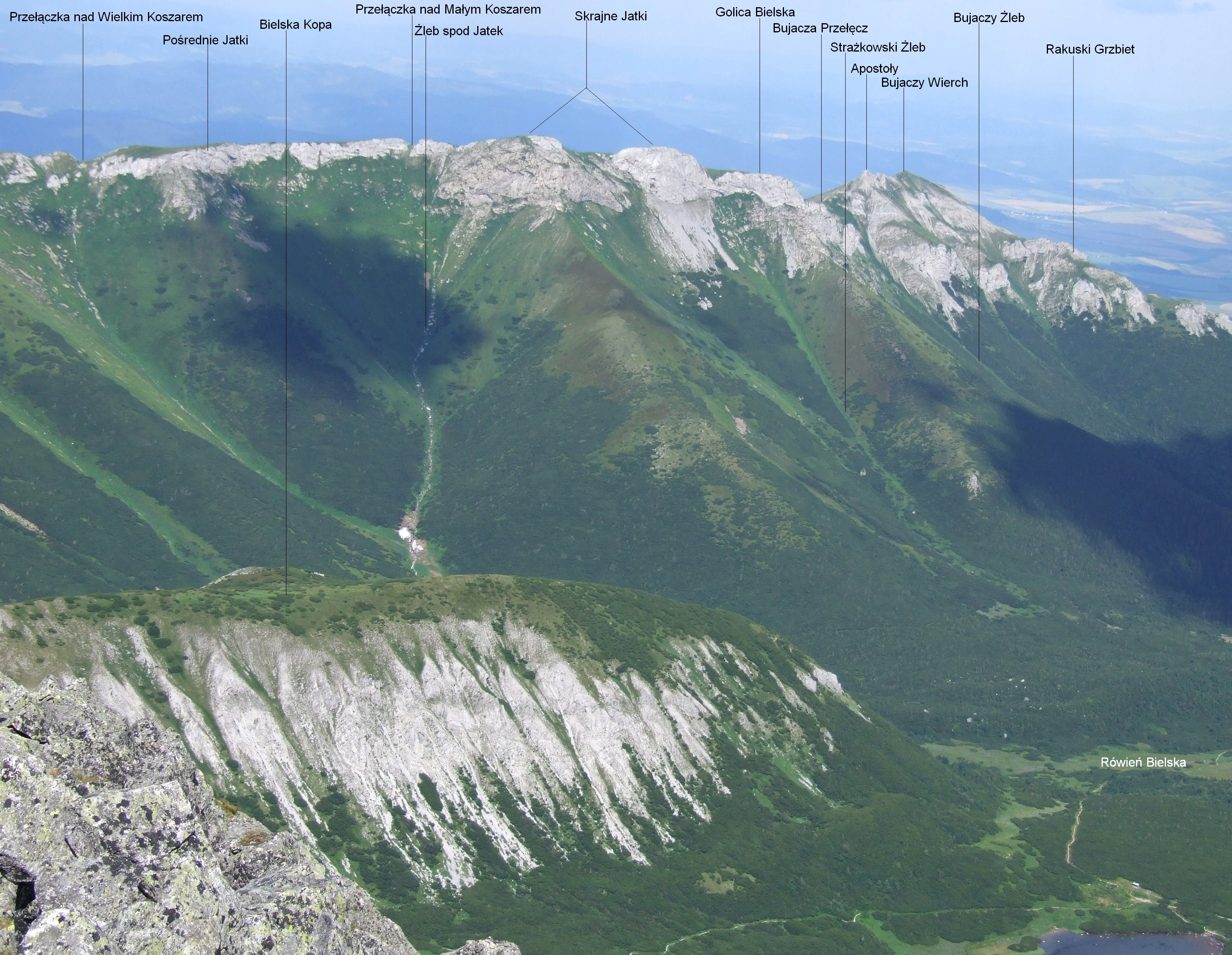 Tatry Bielskie. Widok z Jagnięcego Szczytu